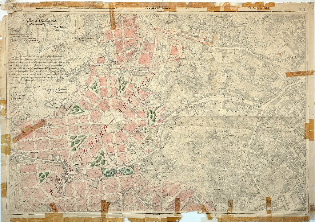 Tavola Schiavoni n.12, "Arenella", opera di Federico Schiavoni. A volte nota come "Tavola Giambarba" dal nome di Adolfo Giambarba, l'ingegnere che su di essa progettò l'intervento del Risanamento di Napoli e il piano regolatore e di ampliamento dei rioni Vomero e Arenella, visualizzati sulle mappe con diversi colori.